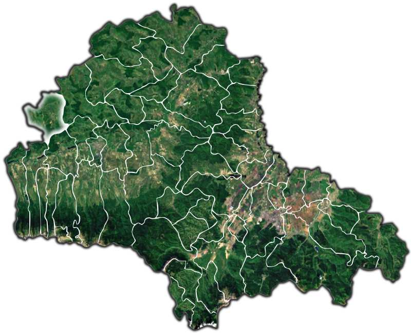 Cincu jud Brasov